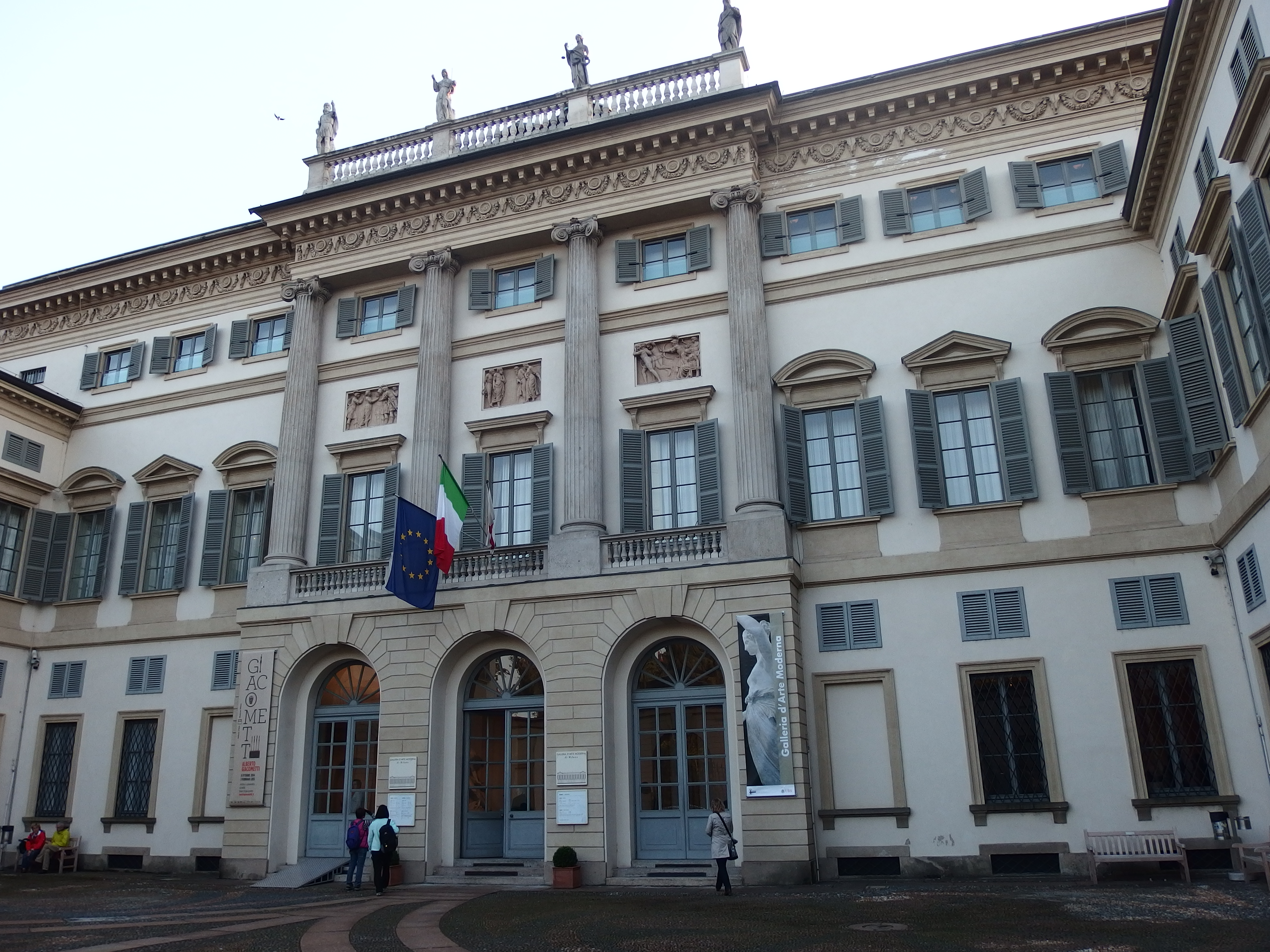 Milano, Villa Reale